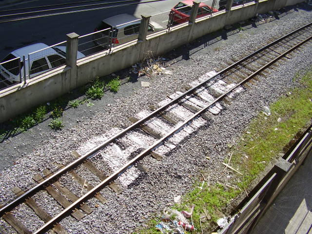 Grafiti en las vías de FEVE a su paso por Bilbao.